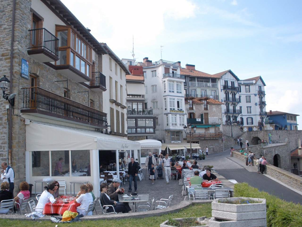 Getaria (Gipúzkoa)